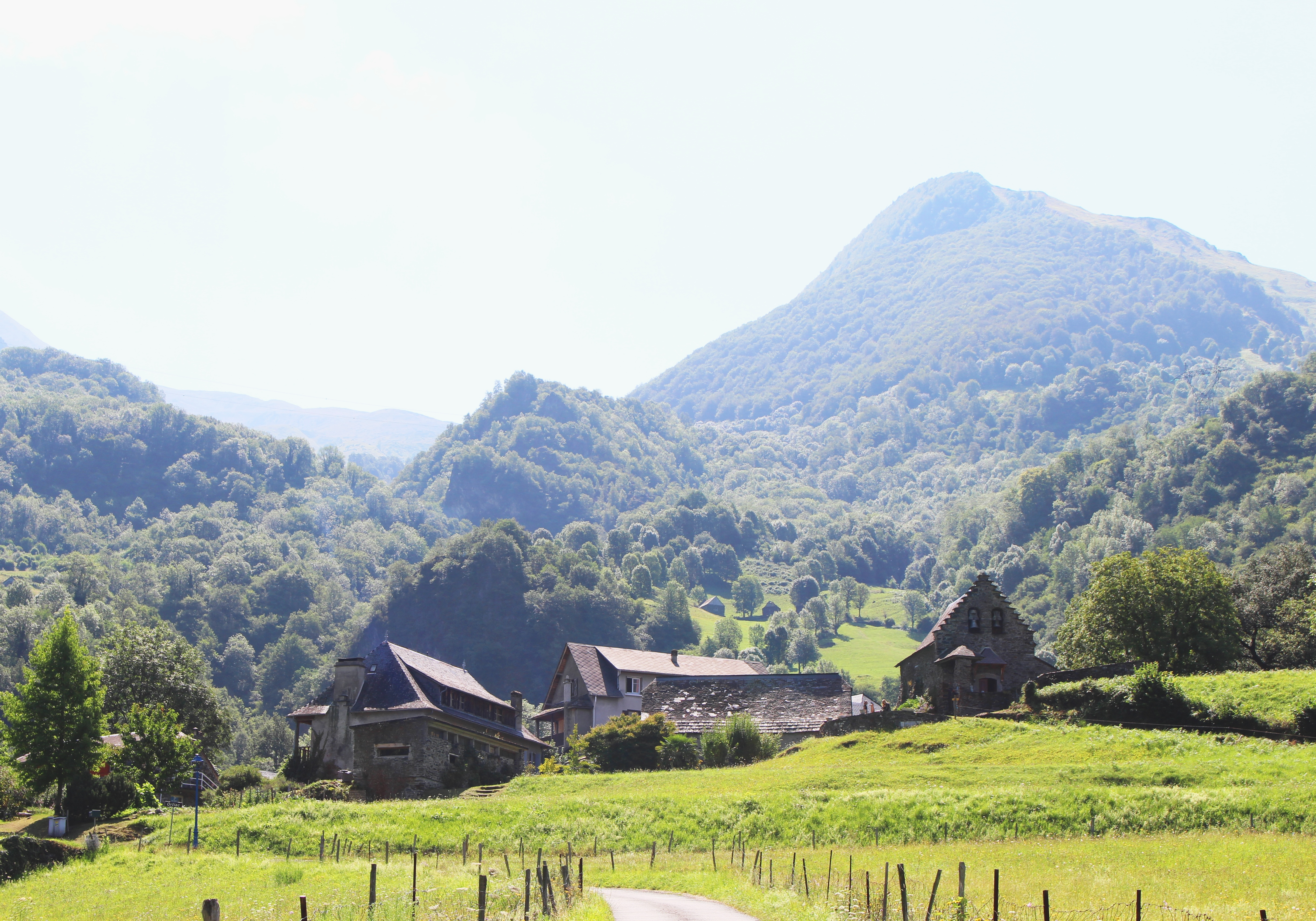 Villelongue (Hautes-Pyrénées)